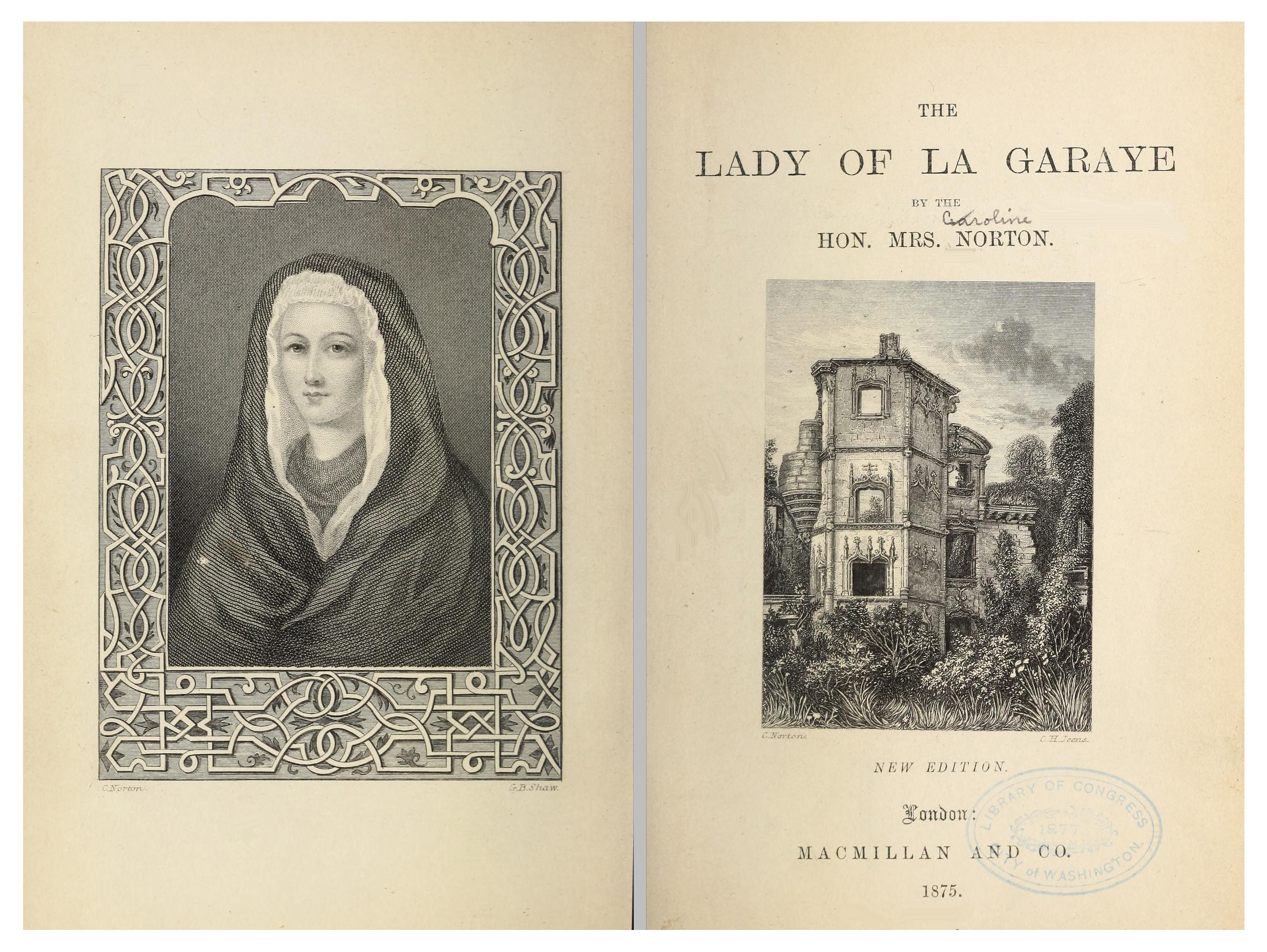 Titelbild und Portrait